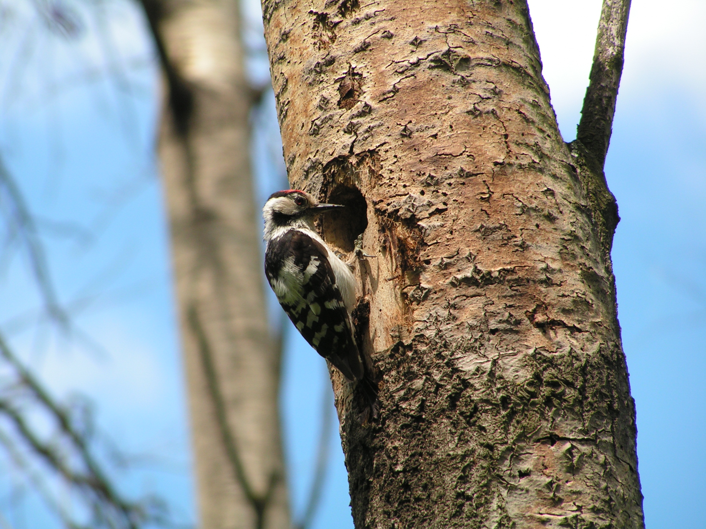 Железнодорожные дачи: Г. Нижний Новгород, Канавинский район, на северо-западной окраине города, к северу от линии железной дороги Н.Новгород - Москва, к северу от п. Доскино,Нижний Новгород, Нижегородская область This image is related to the protected area of Russia number 5210388